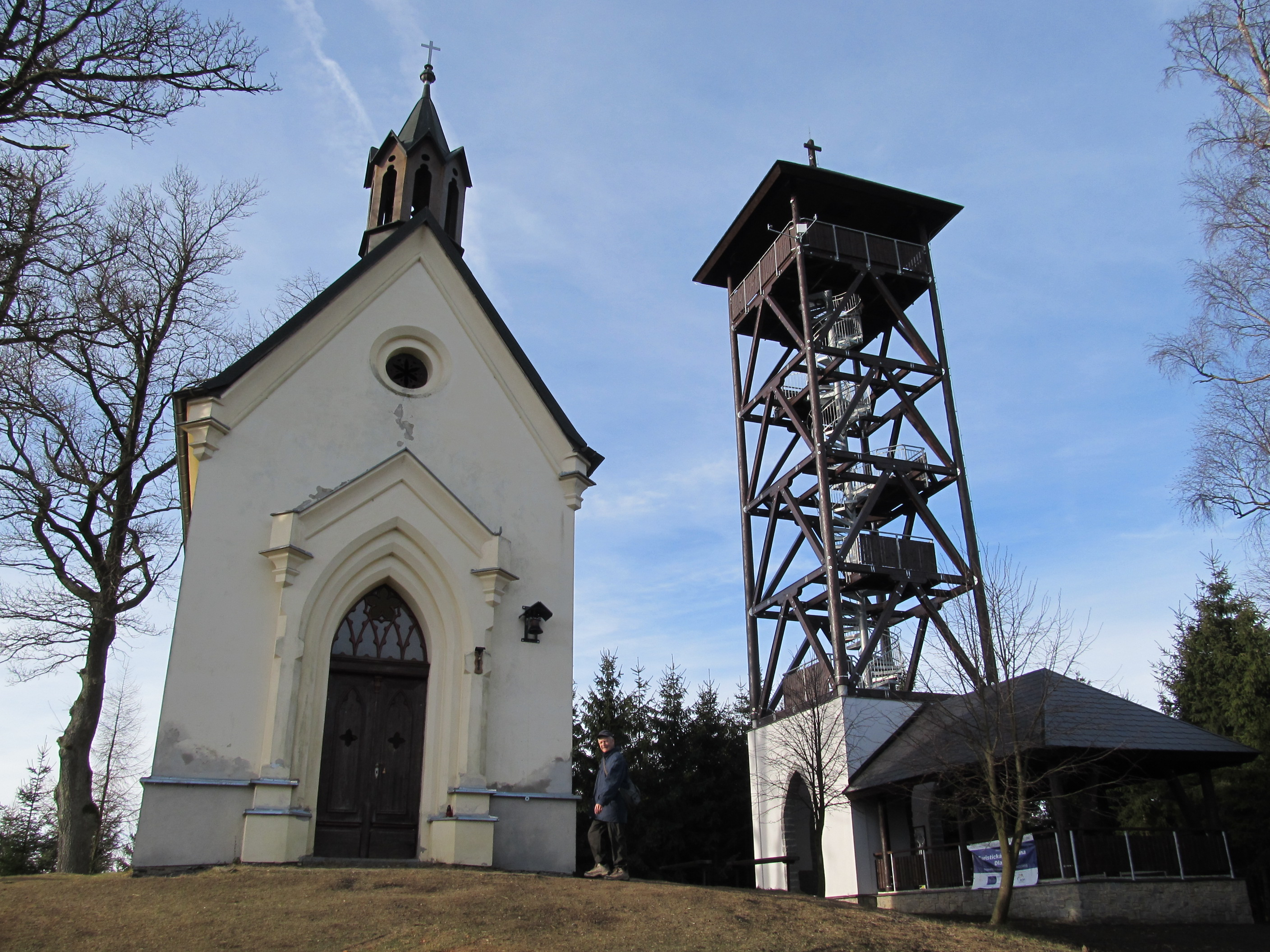 Svatá Markéta nad Dlažovem - kaple sv. Markéty a nová rozhledna